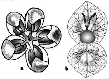 Atriplex halimus; a fleur mâle à cinq tépalesb fleur femelle à deux préfeuilles dont l'antérieure a été rabattue vers le bas